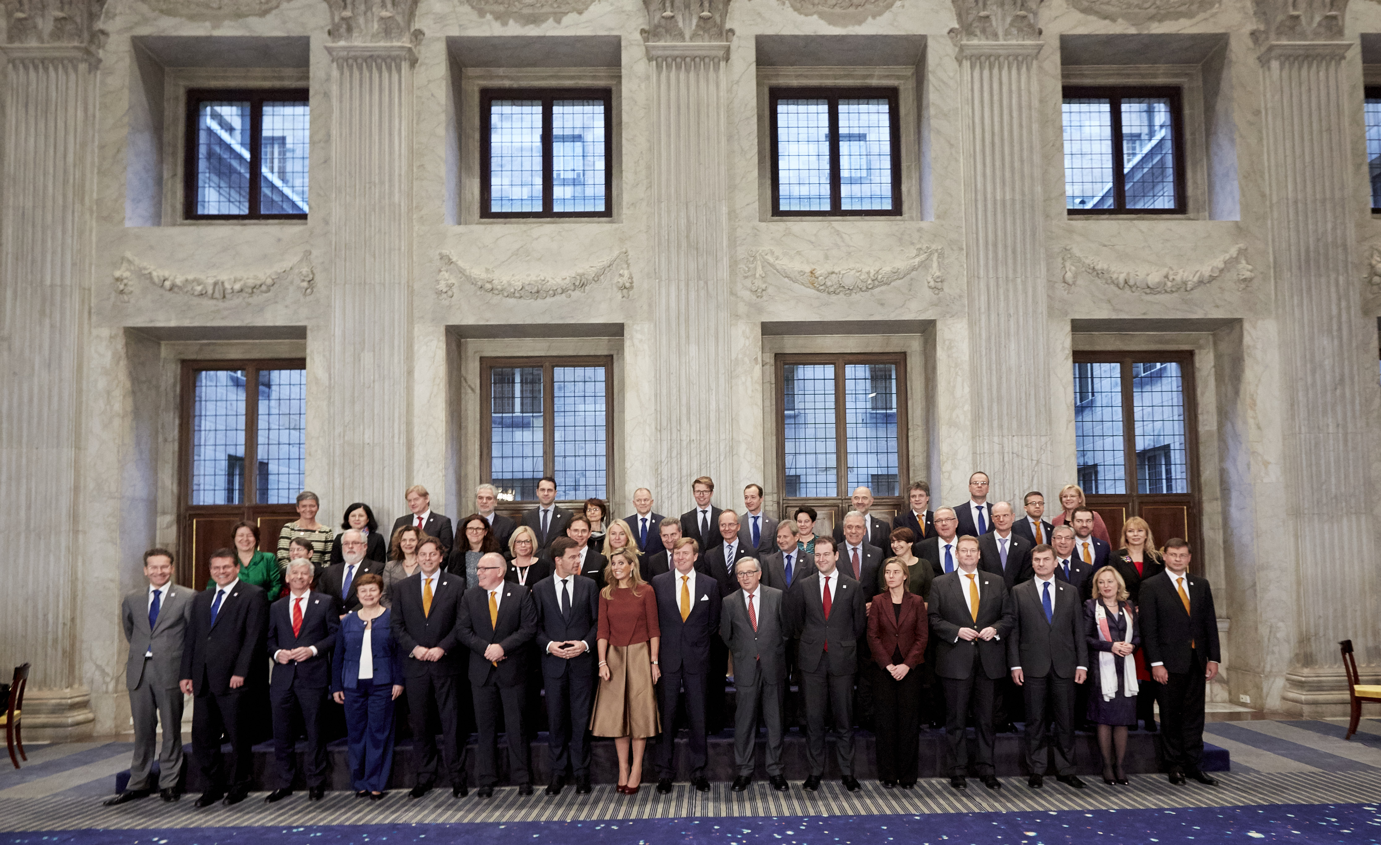 Amsterdam, 7 januari 2016 / Amsterdam, January 7th 2016. Familiefoto van de Europese Commissie. Family photo of the European Commission. Royal Palace Amsterdam. Queen Maxima, King Willem-Alexander Foto: Rijksoverheid/Martijn Beekman – Photograph: Dutch Government/Martijn Beekman